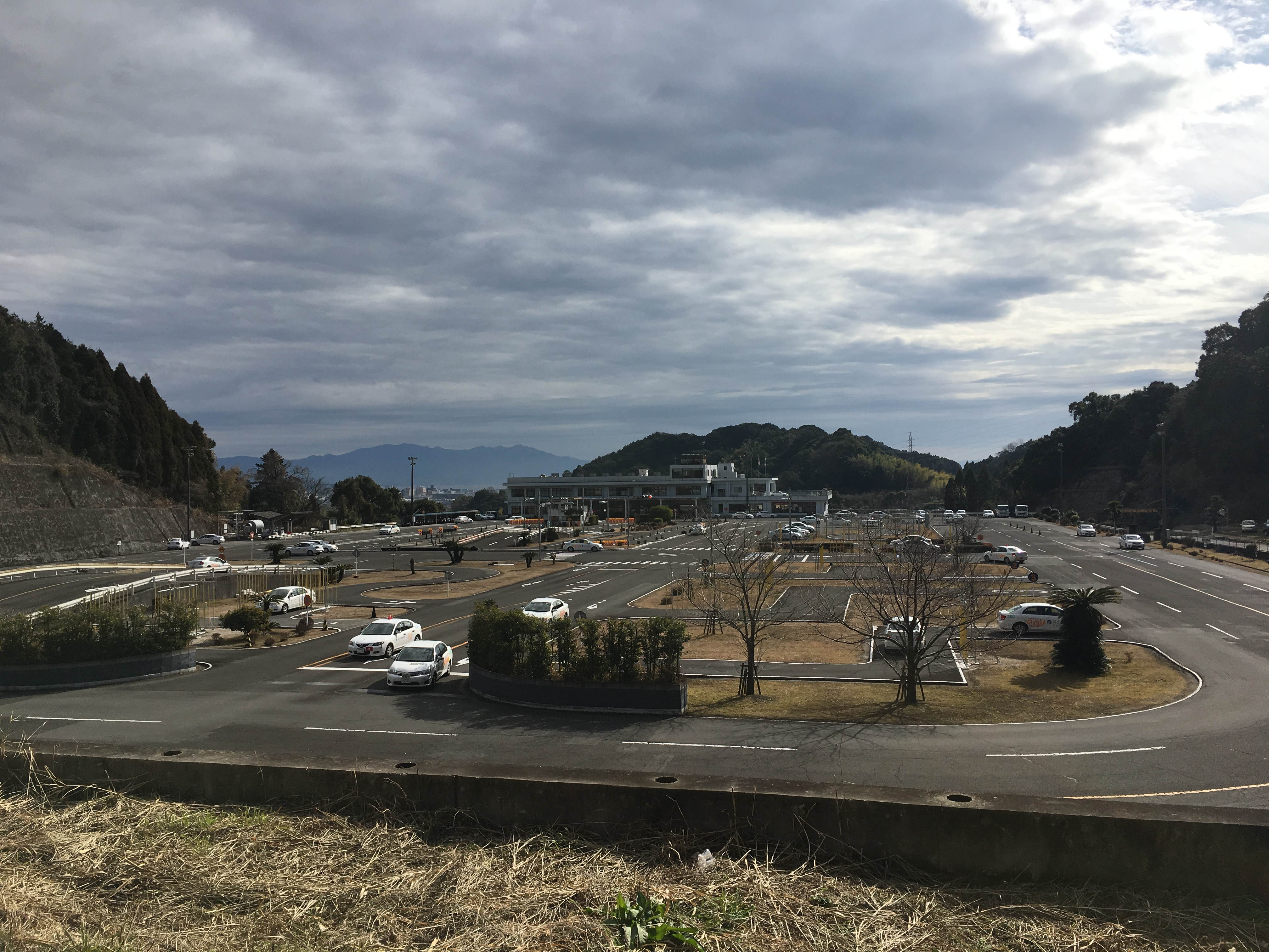 谷山中央自動車学校のコースを公道上から撮影